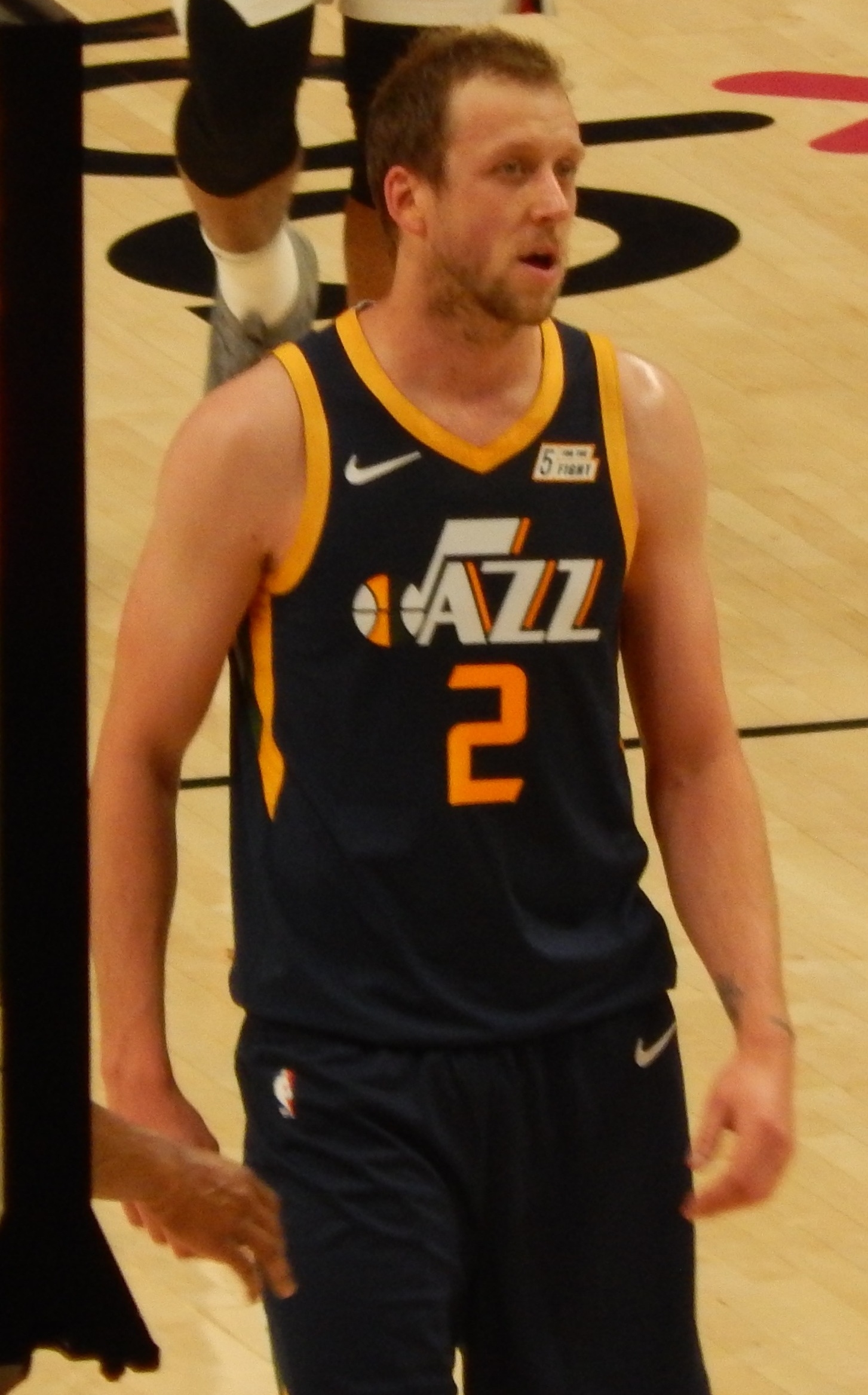 Joe Ingles #2 of the Utah Jazz against the Portland Trail Blazers on October 7, 2018 at Moda Center in Portland, Oregon.